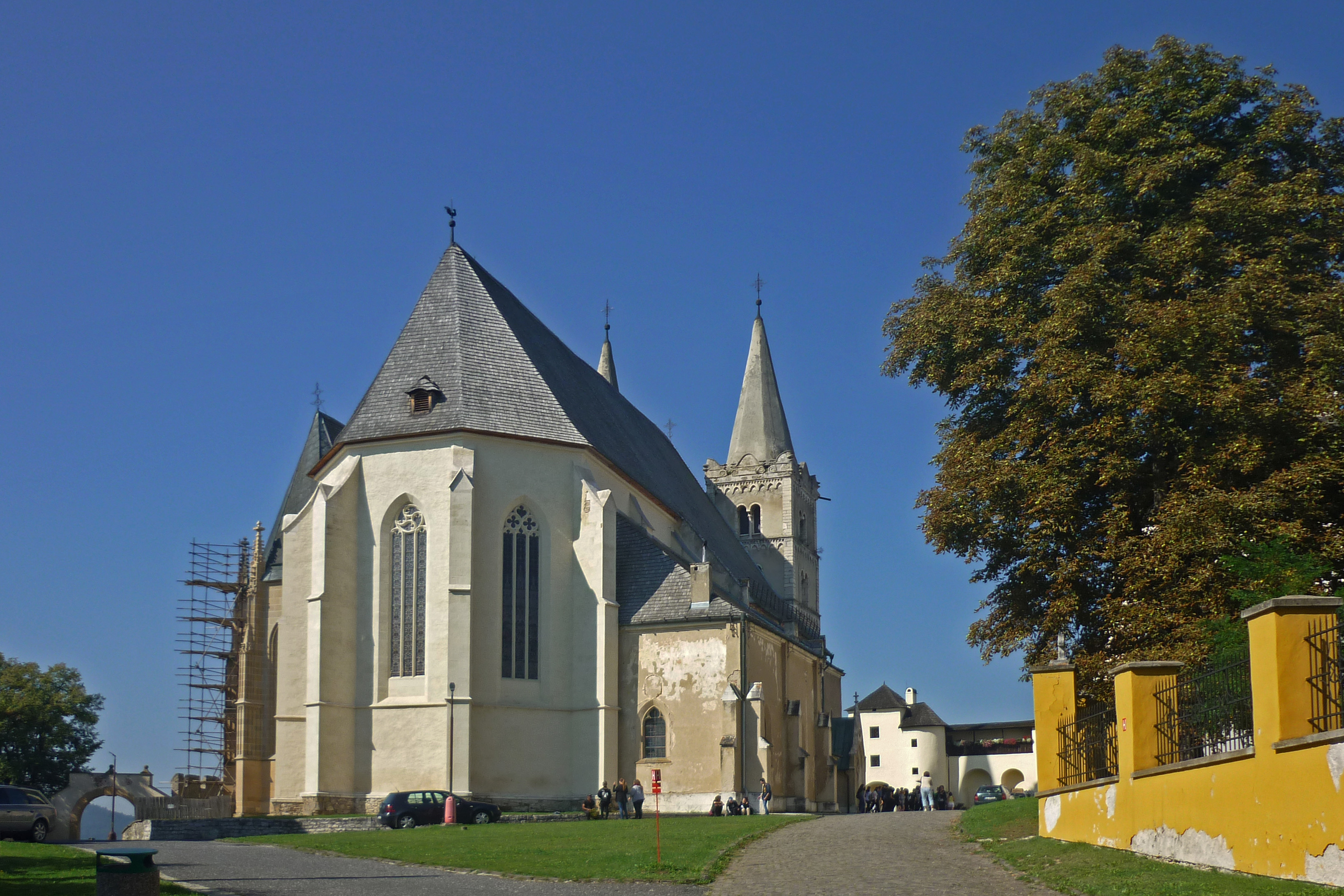 Martinskirche in Spišská Kapitula (Zipser Kapitel) in der Slowakei